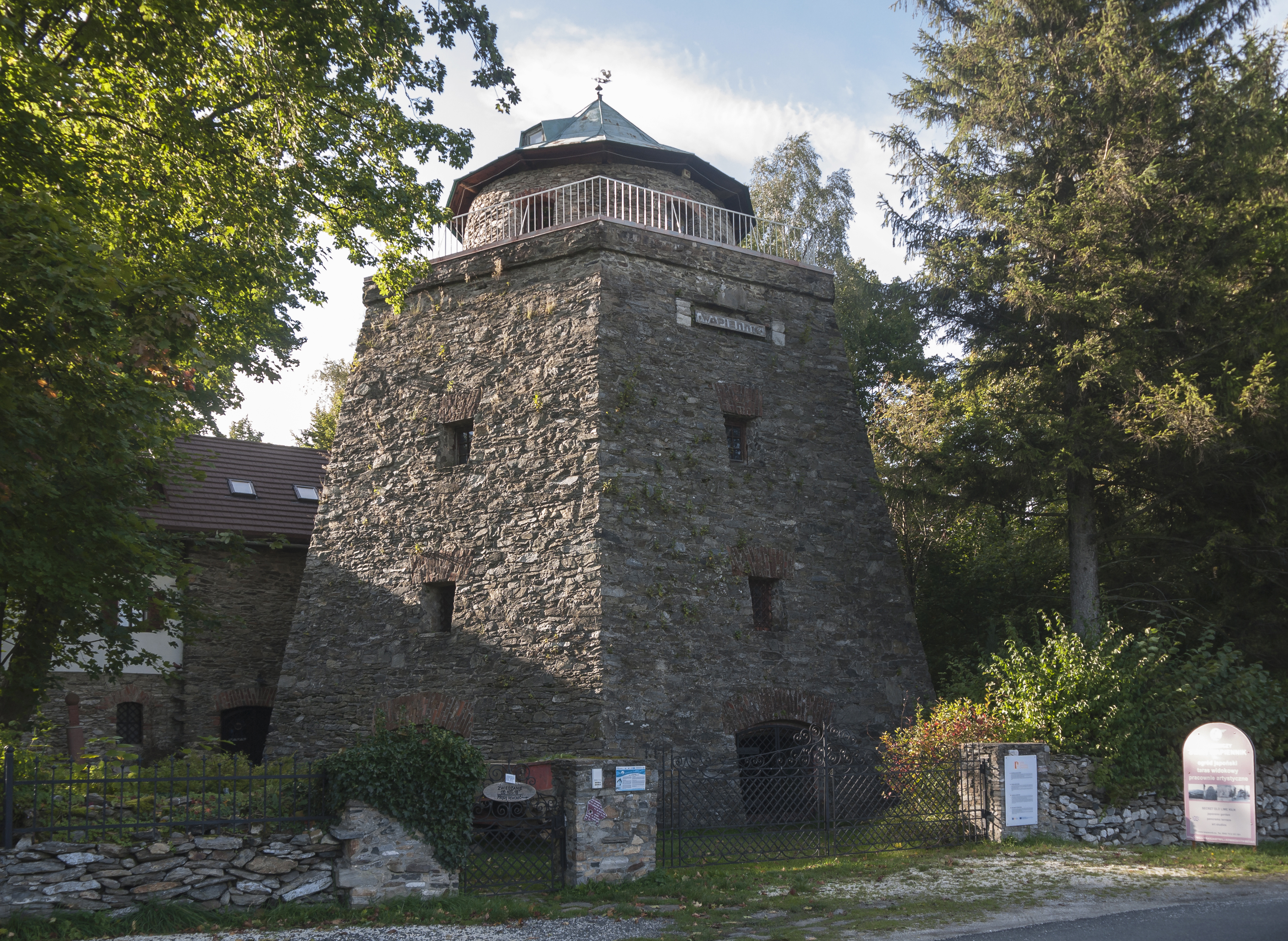 Stara Morawa, wapiennik, XVIII